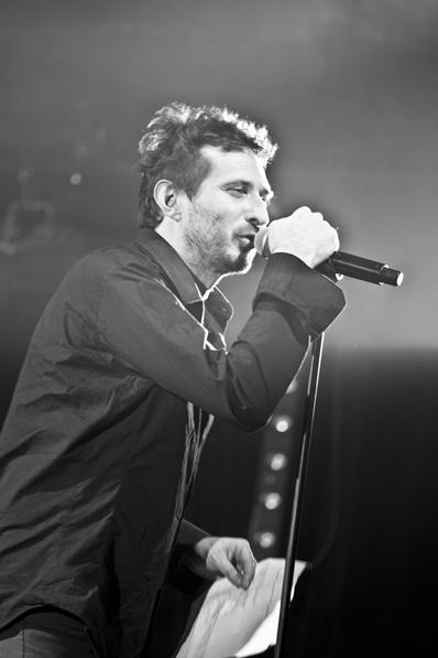 Loïc Lantoine en concert